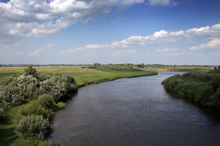 Rzeka Niemen Foto. Robert Danieluk